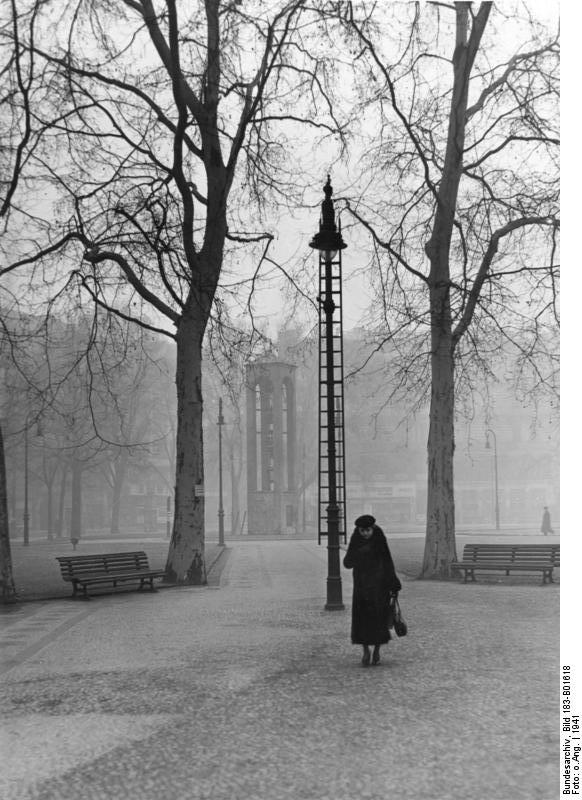 Berlin, Dönhoffplatz, Passantin Berlin; Am Dönhoffplatz, 1941 2812-41 [Berlin, Dönhoffplatz.- Spaziergängerin bei diesiger Stimmung (leichter Nebel)]